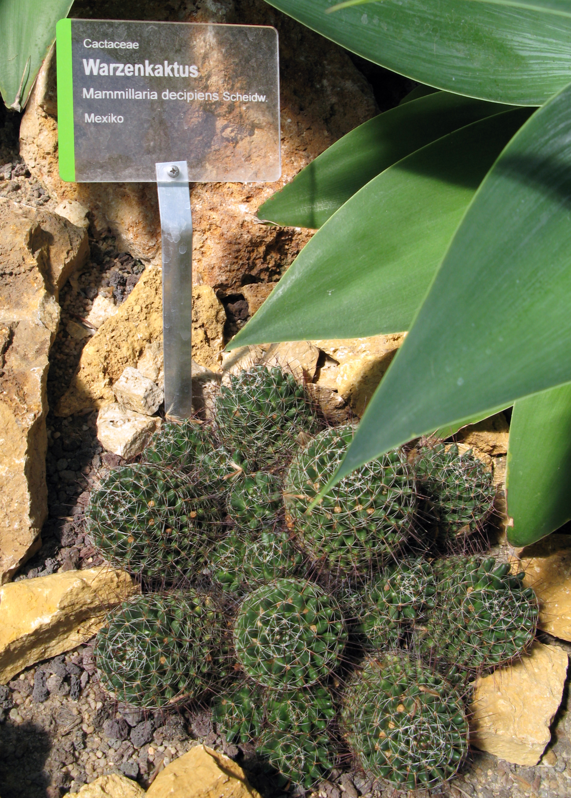 Cactaceae - Mammillaria decipiens - Warzenkaktus aus Mexiko, aufgenommen im Stuttgarter Zoo Wilhelma